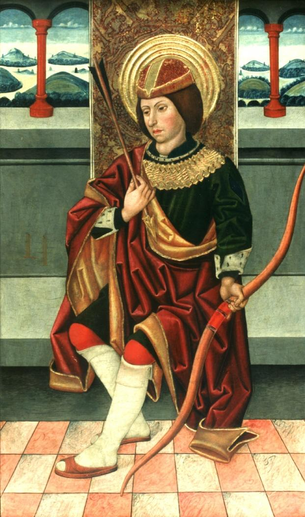 La obra representa al mártir San Sebastián, que murió asaeteado por profesar el cristianismo.